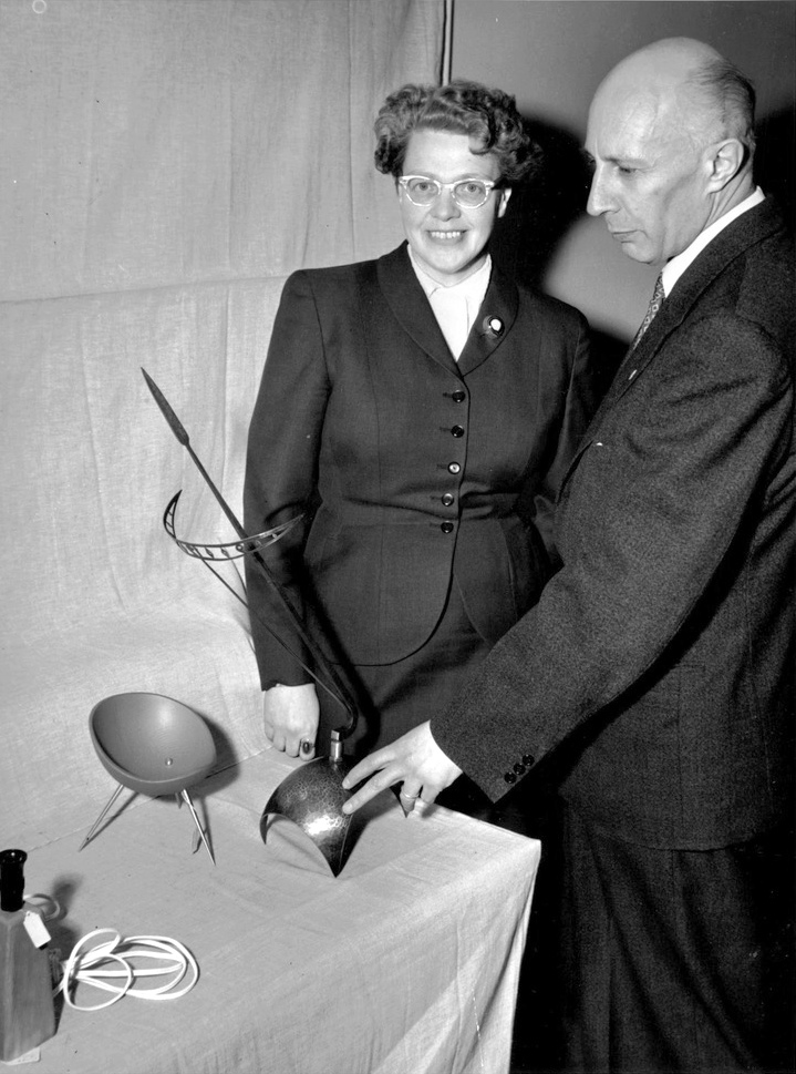 Doktor Marita Lindgren-Fridell och konsulent Torsten Philipson beundrar två vackra slöjdsaker: ett graciöst solur i koppar och en glad röd träskål på mässingsben.Kanske var det en och annan slöjdlärare som förfasade sig en smula över doktor Marita Lindgren-Fridells frifräsarpraoller, då hon på måndagen gick till storms mot gamla ideal inom träslöjden. Hon hävdar nämligen, att slöjden först och främst ska vara estetiskt fostrande, den ska väcka intresse för form och inte lägga så stor vikt på att göra allting så duktigt och hantverksmässigt. Det var på slöjdlärarkongressen i Fredhälls folkskola inför 150 slöjdlärare från Stockholms läns södra inspektionsområde som dr Marita agerade braständare.